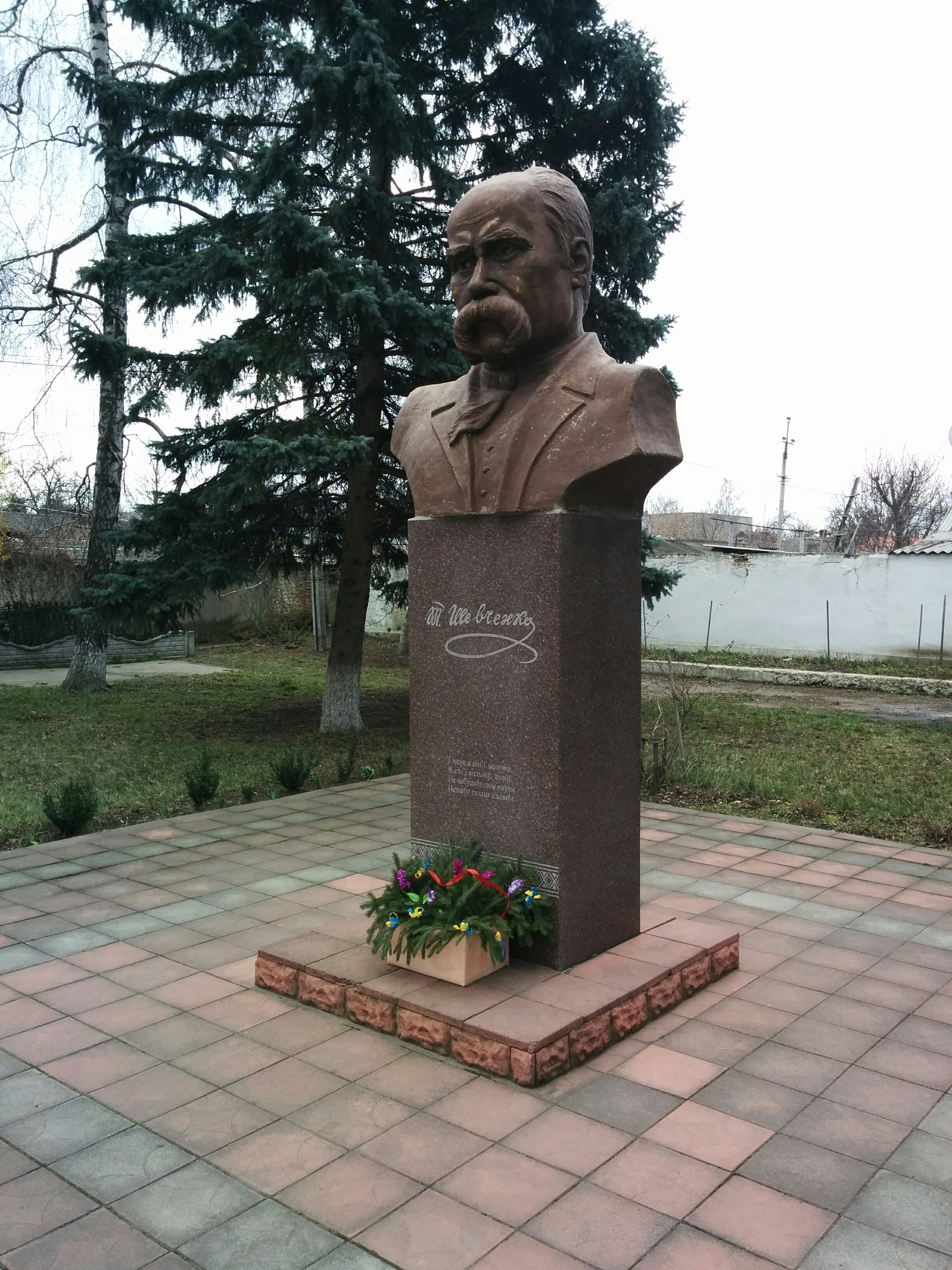 Саврань Одеська область